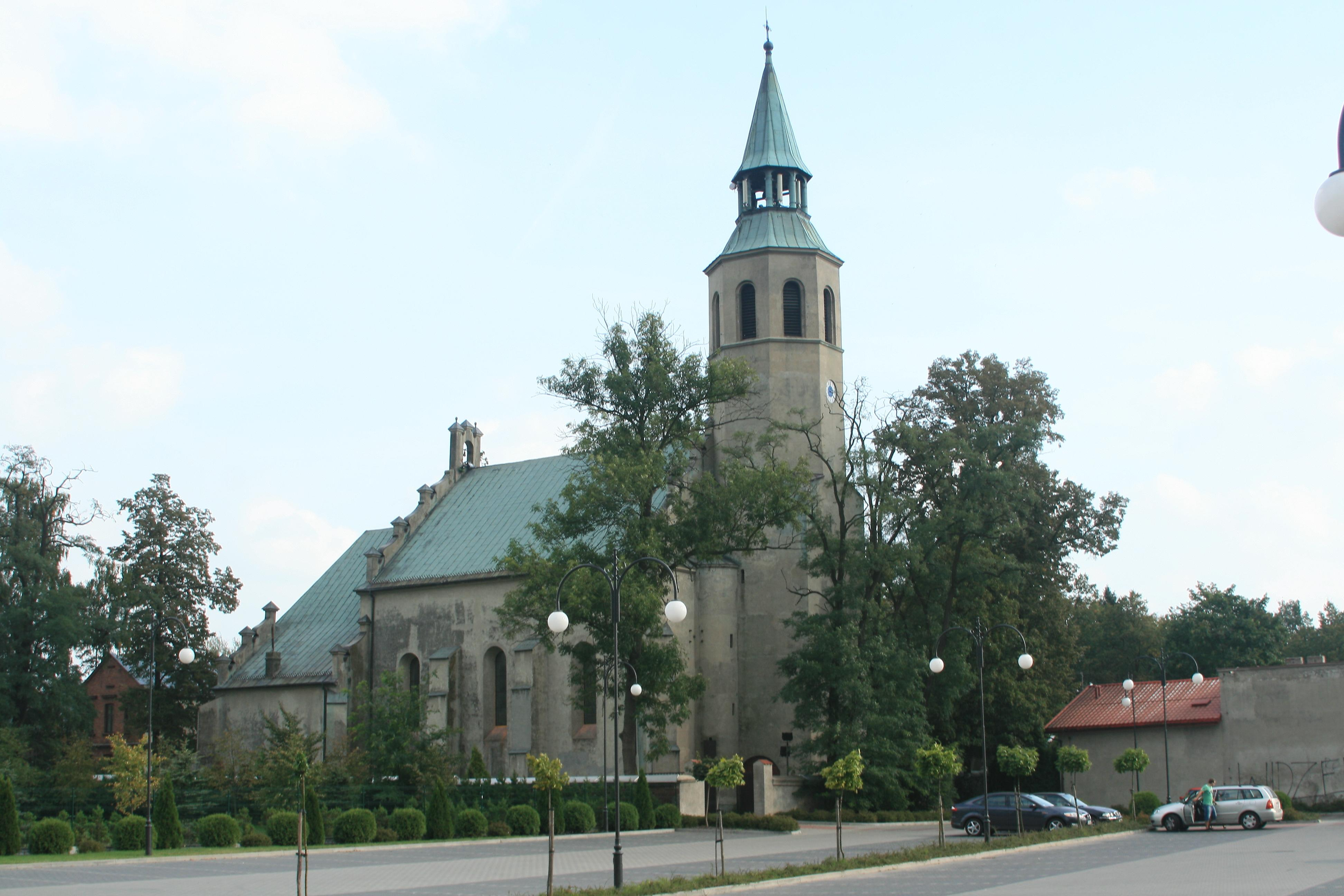 Rzgów, Poland